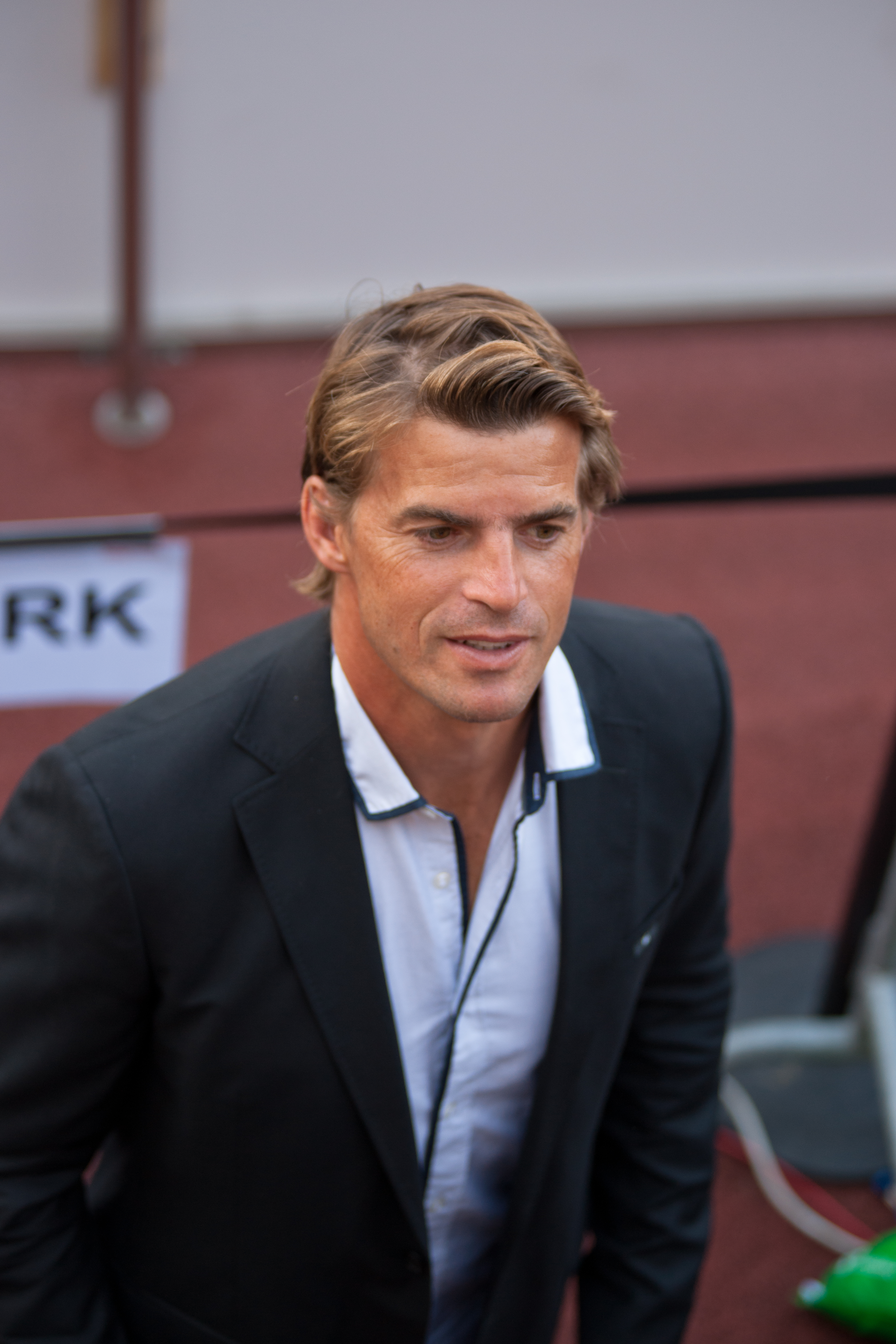 Athletissima 2012 - Jean Galfione